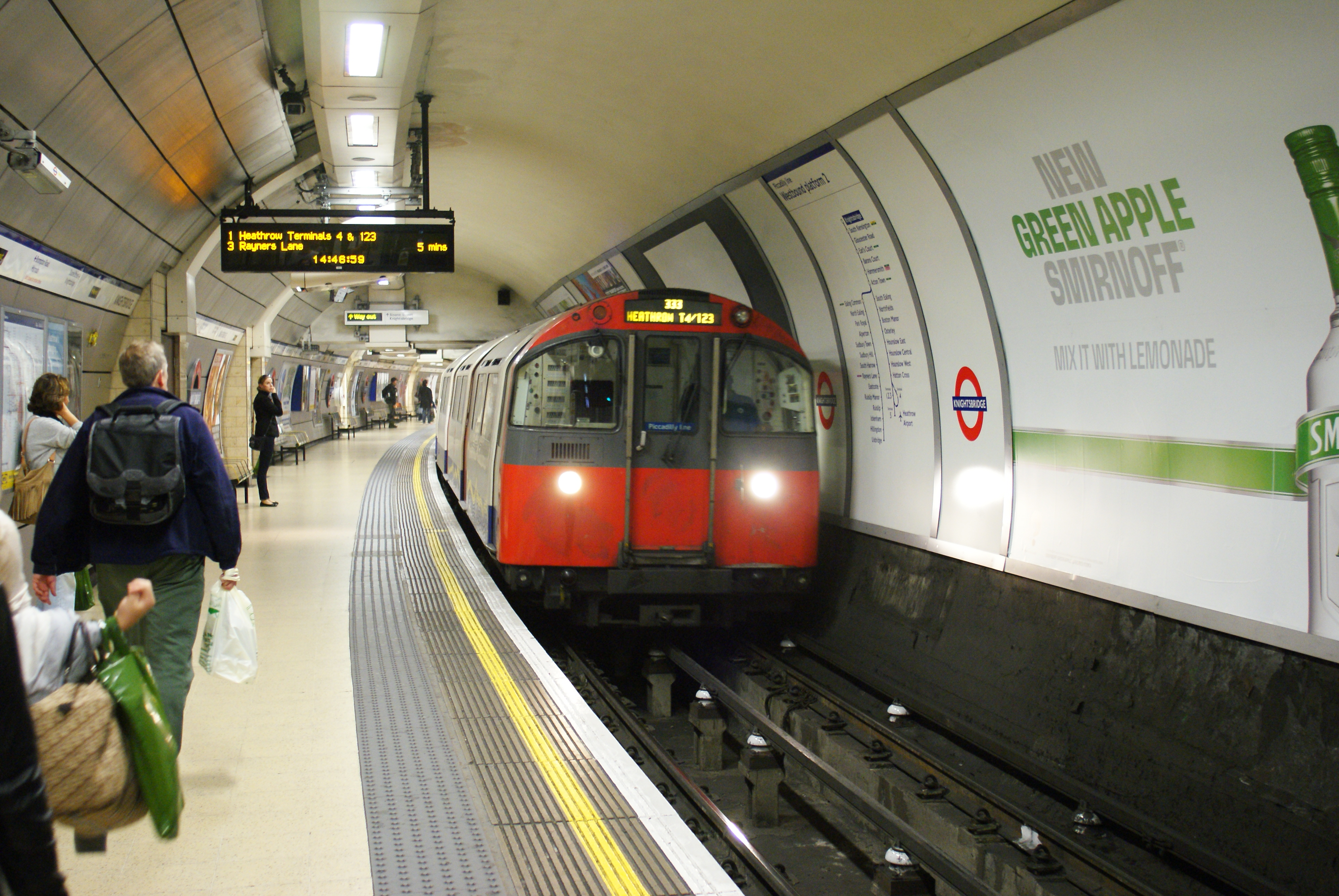 KNIGHTSBRIDGE-4 261009 CPS